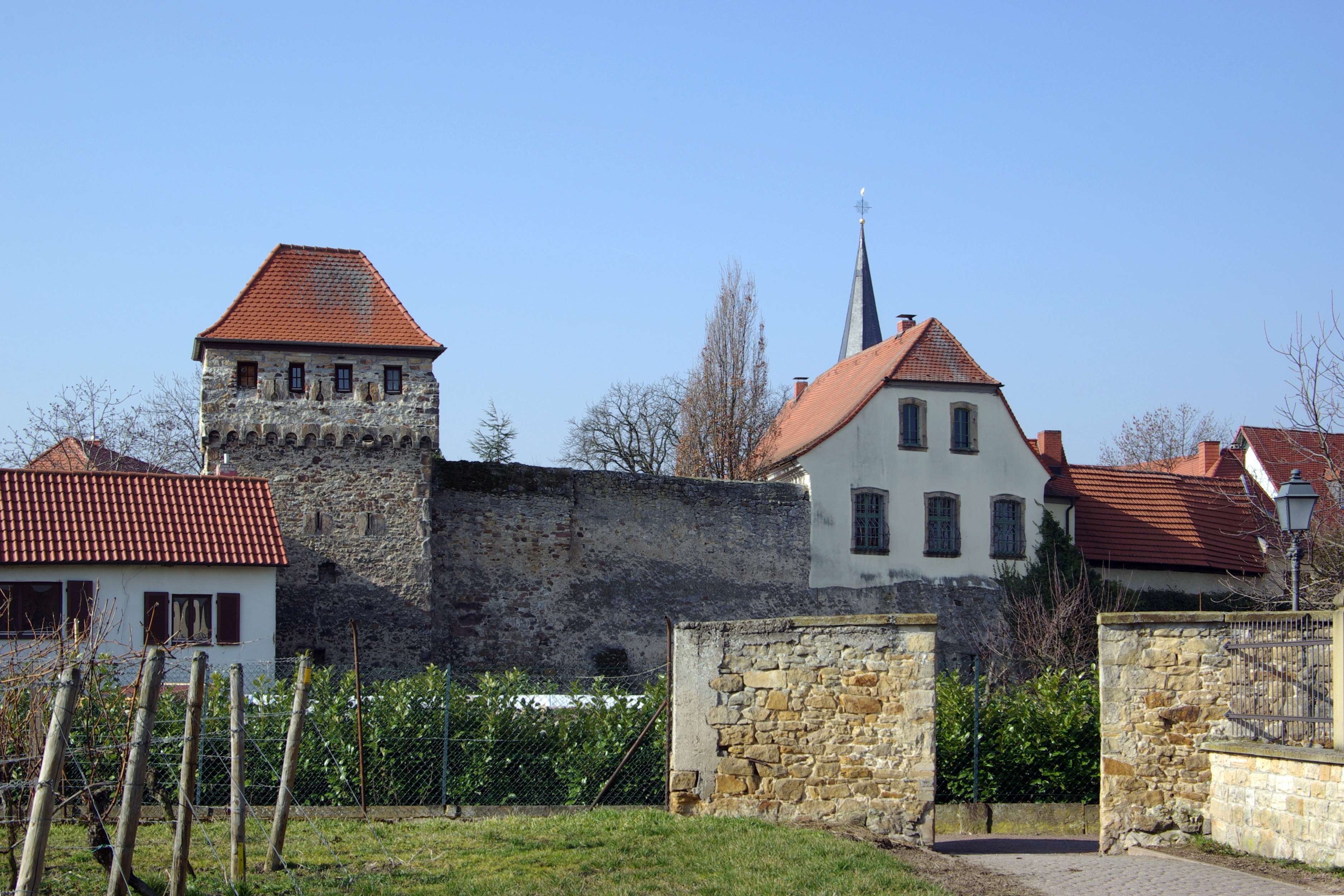 Freinsheim, Teil der Stadtmauer mit Hahnenturm und Gottfried-Weber-Haus